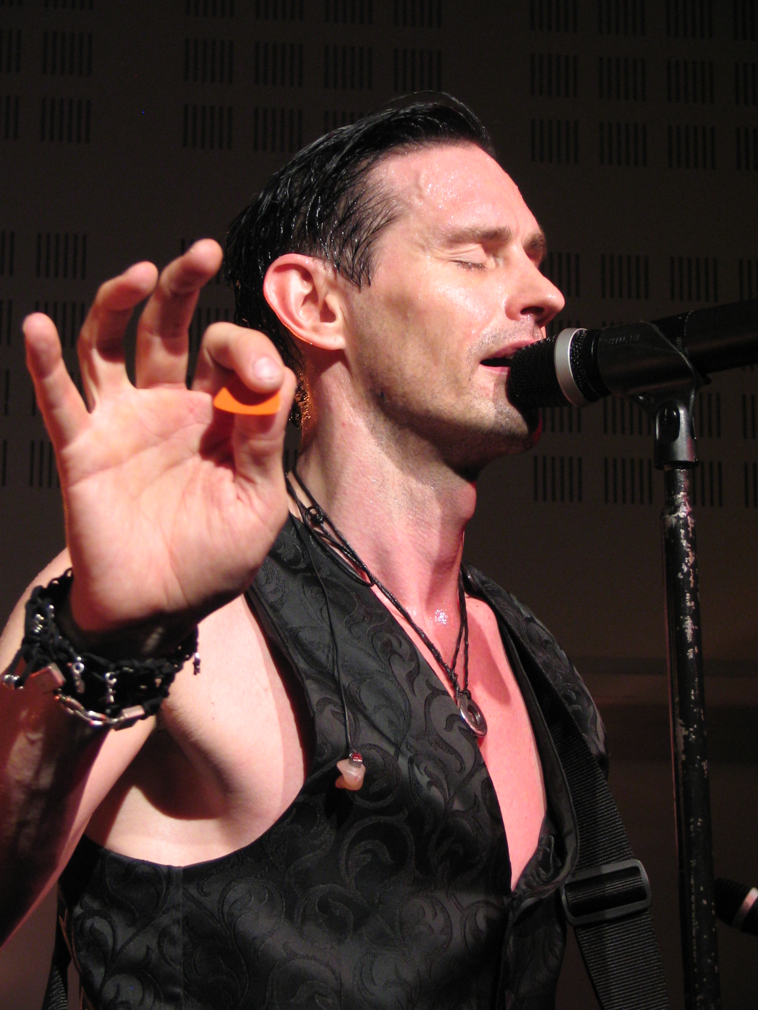 Keikalla Lappajärvellä